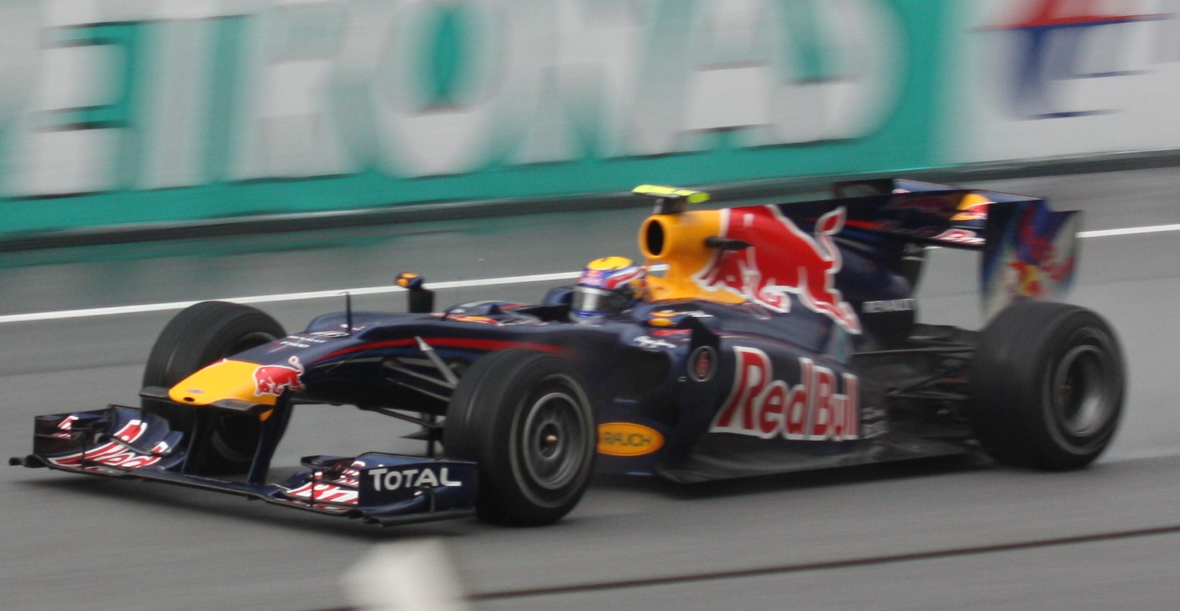 Webber Malaysia